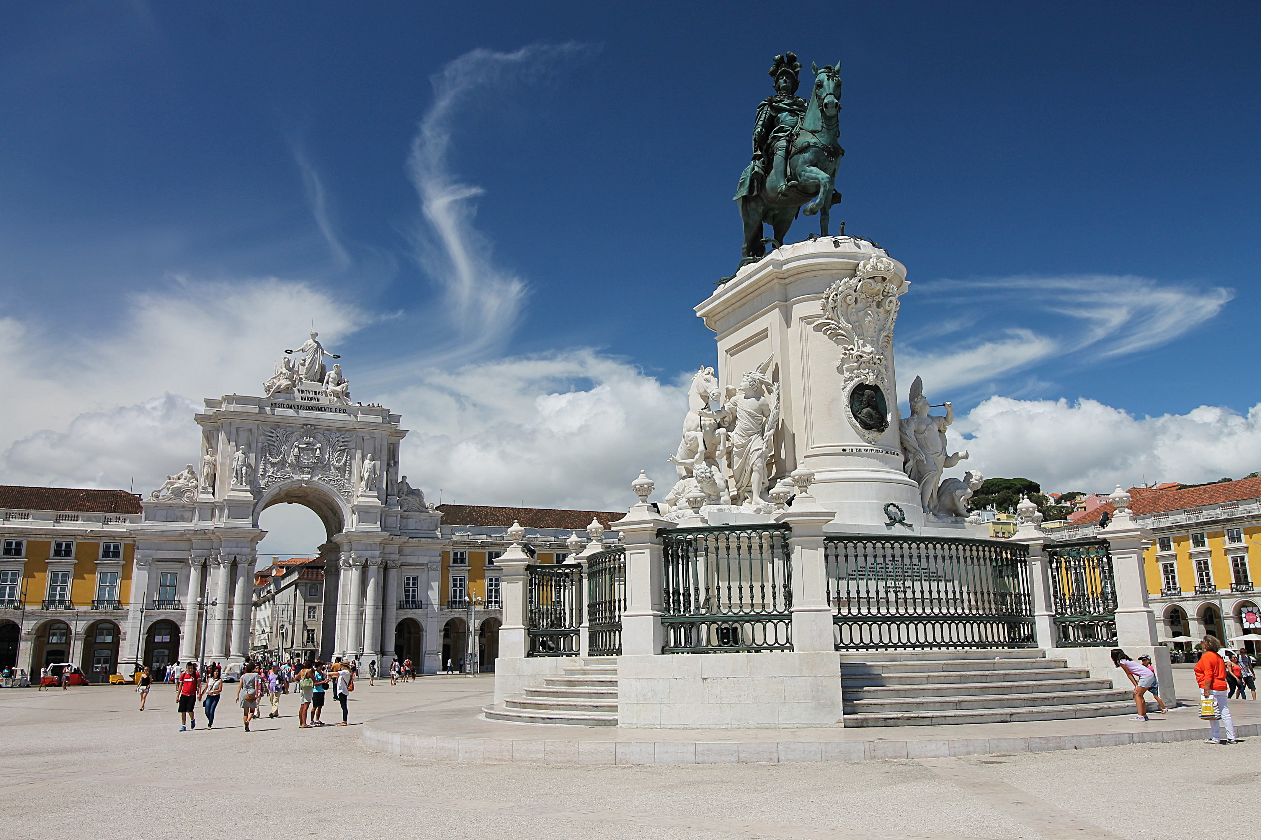 La praça do Comercio est le lieu symbolique de la puissance et de la grandeur historique du pays. La place existait déjà avant le tremblement de terre qui a ravagé la ville basse en 1755. Les visiteurs arrivant majoritairement par voie maritime, la praça do Comercio, située sur le bord du Tage, était considérée comme la porte d'entrée de Lisbonne.